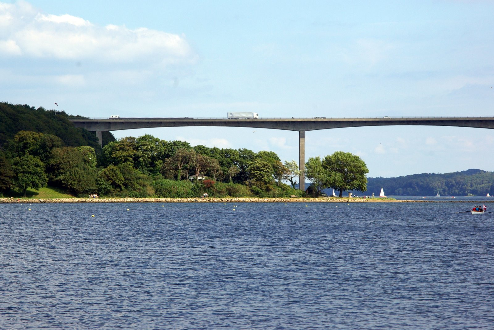 Vejle fjordi silla põhjapoolne ots